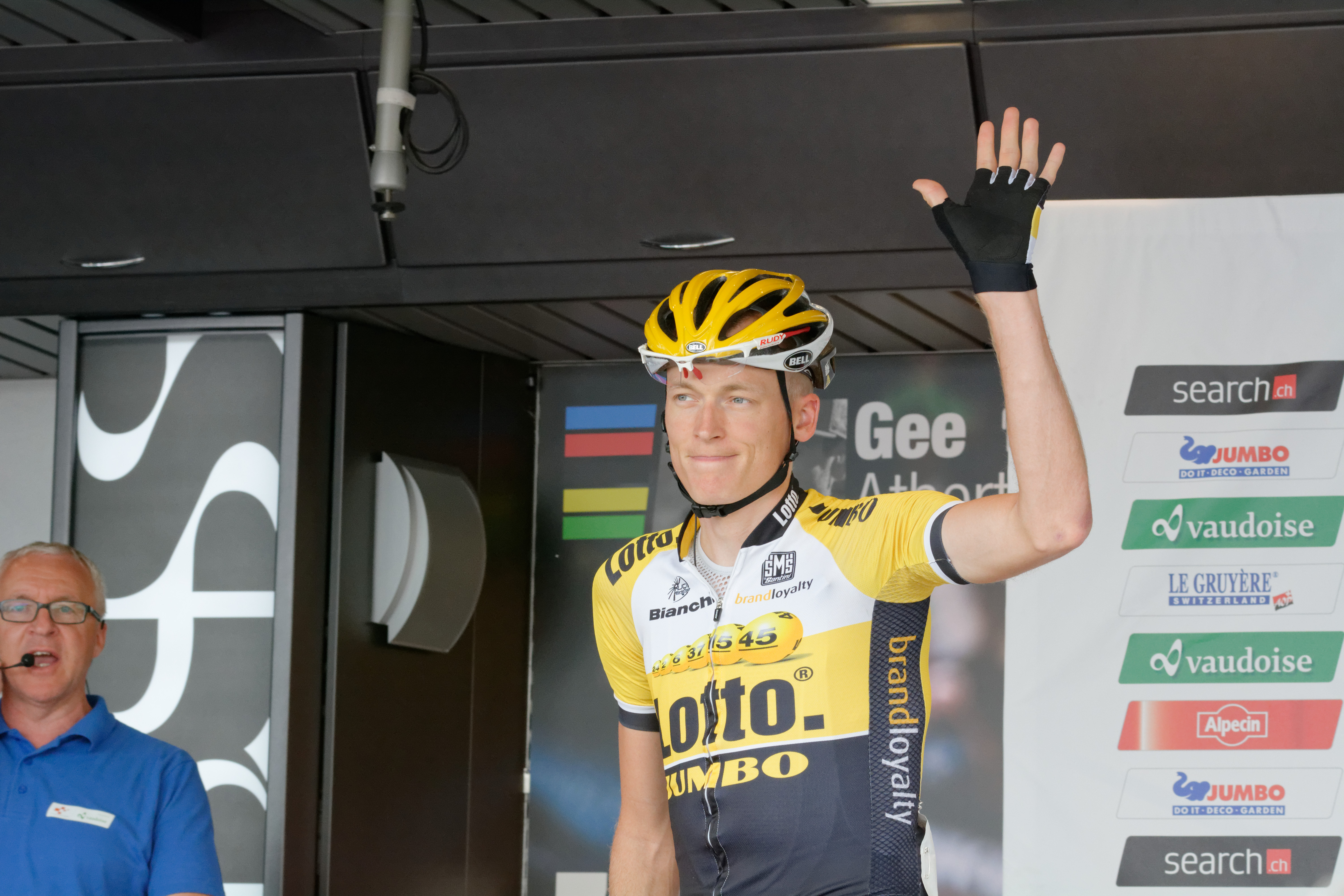 D71_9857_DxO